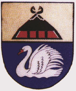 Der Giebel eines niedersächsischen Bauernhauses symbolisiert die große Bedeutung der Landwirtschaft und die geographische Lage der Gemeinde. Die vier Gefache weisen auf die vier Orte hin, aus der die Gemeinde besteht. Der Schwan kommt auf den zahlreichen Teichanlagen häufig vor, die das Landschaftsbild der Gemeinde prägen.